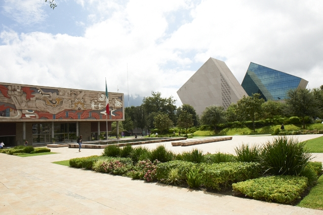 Rectoria y Cetec